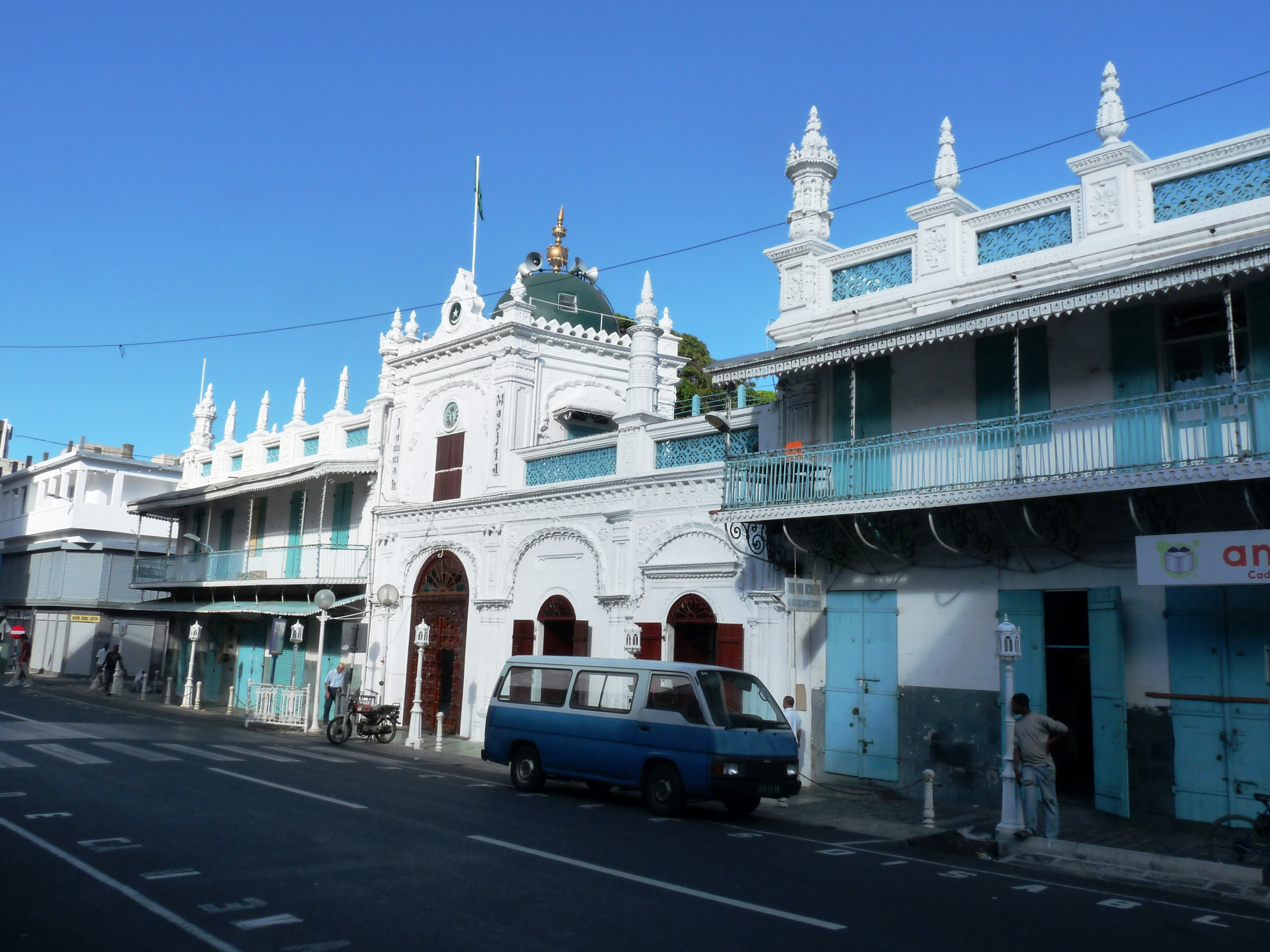 La Mosquée Jummah Masjeed à Port Louis sur l’Ile Maurice.